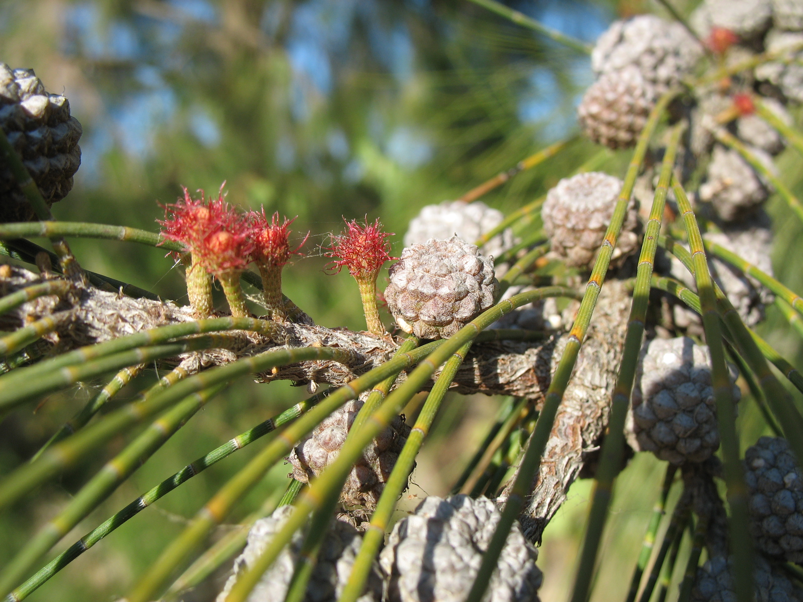 Casuarina equisetifolia (planta alóctona, asiática). Cabanas de Tavira, Portugal.